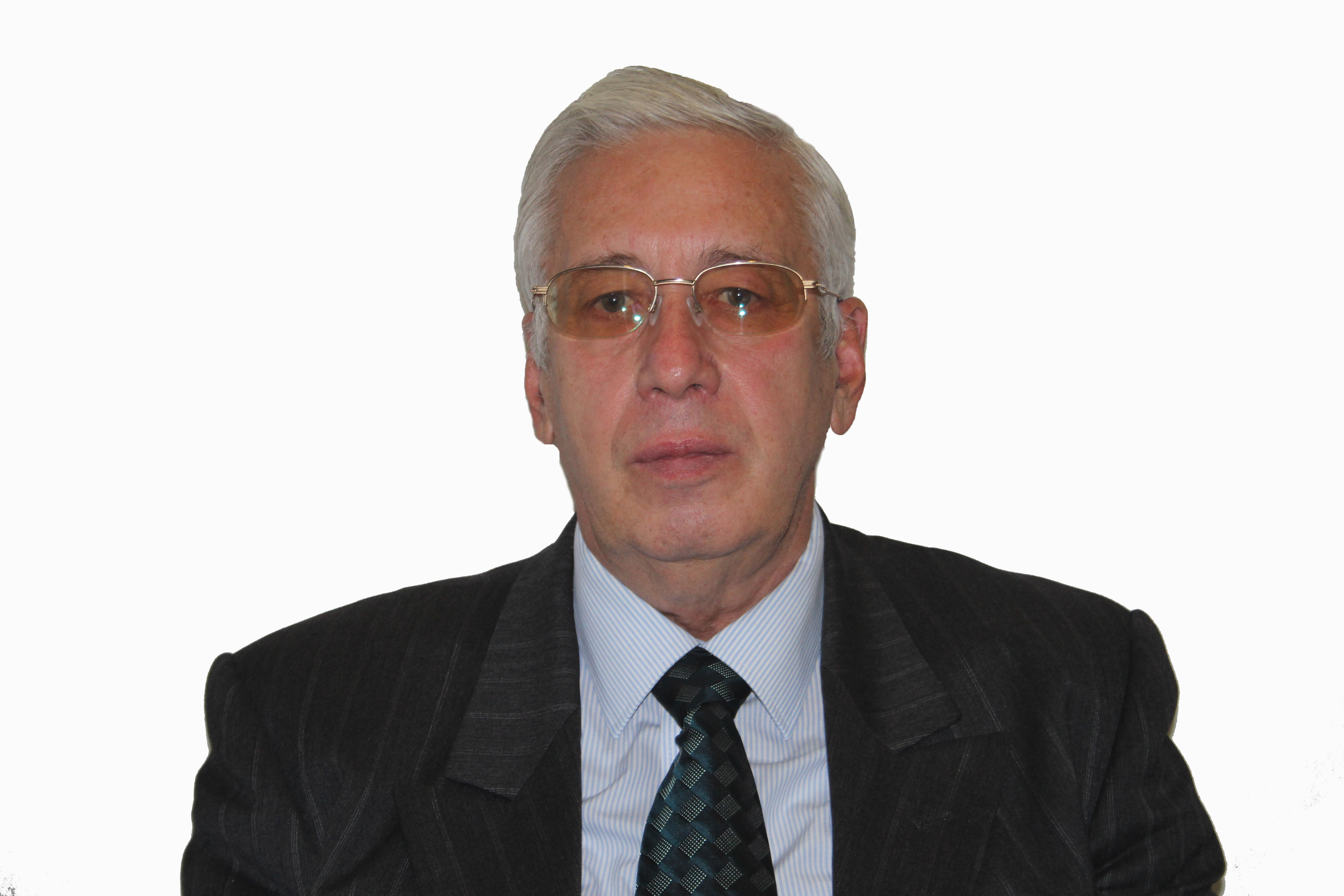 Мелихов Игорь Александрович- Чрезвычайный и Полномочный Посол, Доктор исторических наук.